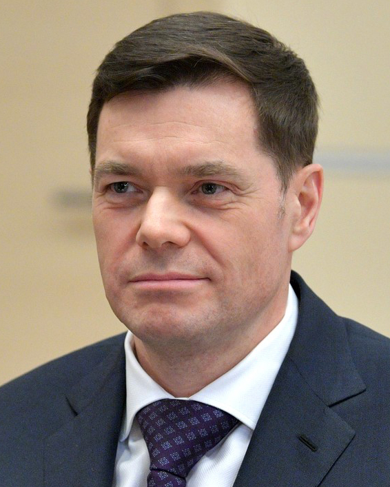 Председатель совета директоров ПАО «Северсталь» Алексей Мордашов во время встречи с Президентом России Владимиром Путиным